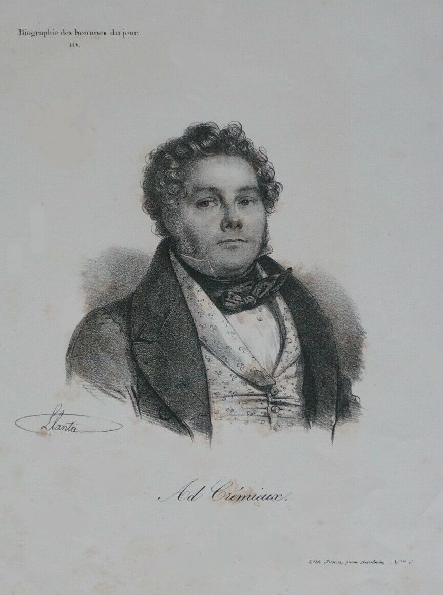 Adolphe Crémieux, gravure de Jacques-François-Gaudérique Llanta, Biographie des hommes du jour.